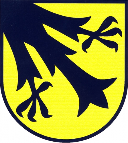 znak, Jasenice, okres Třebíč